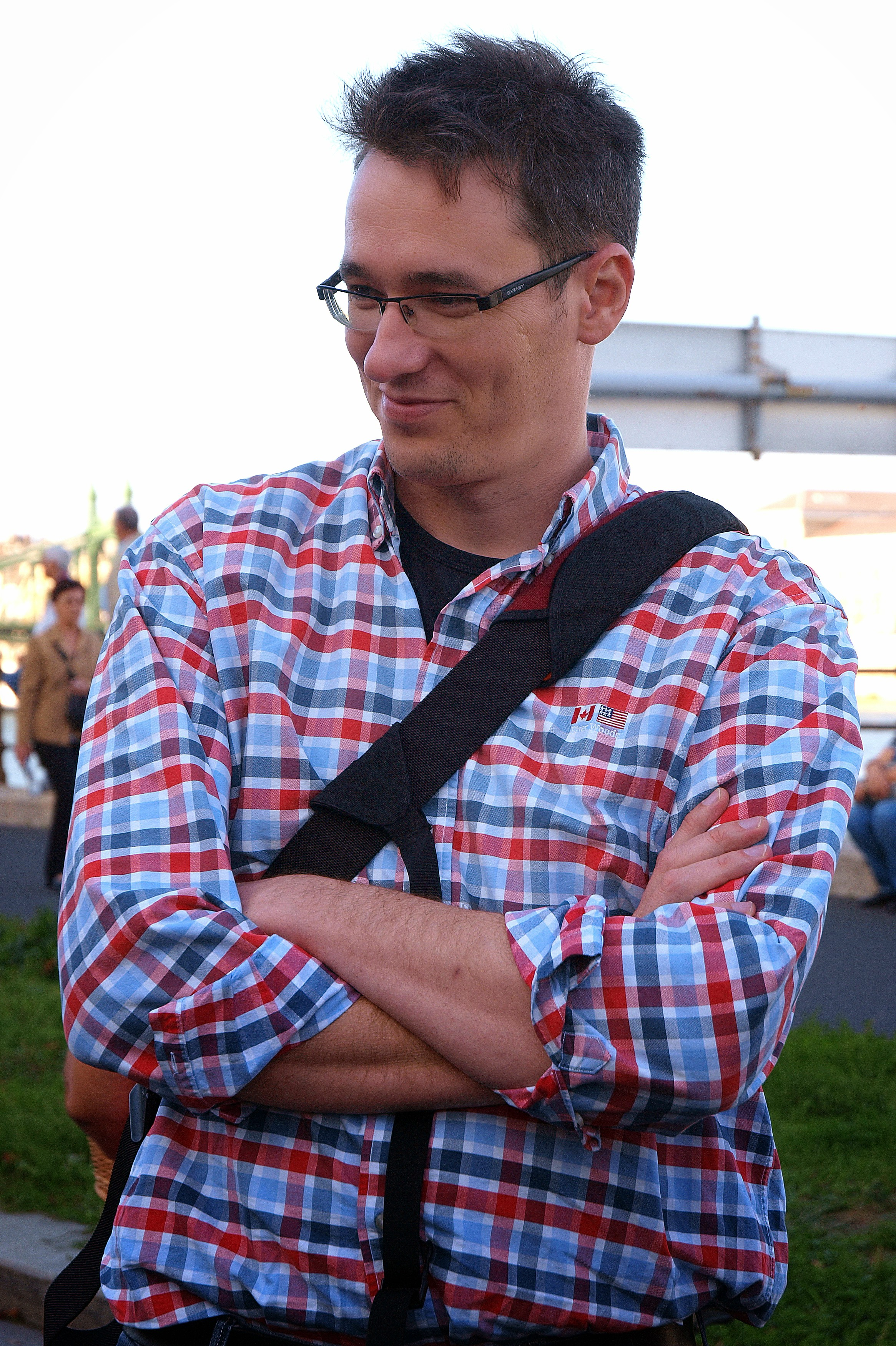 Karácsony Gergely az ellenzéki pártok demonstrációján a Műegyetem rakparton.